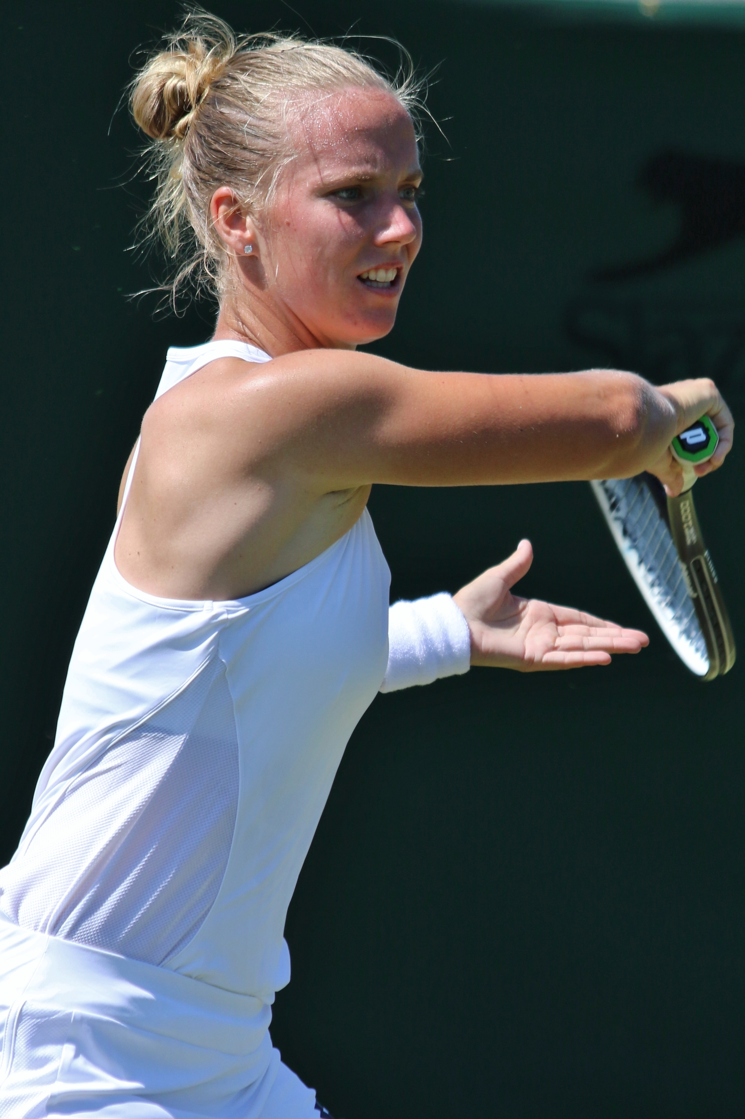 Hogenkamp WMQ18 (9)